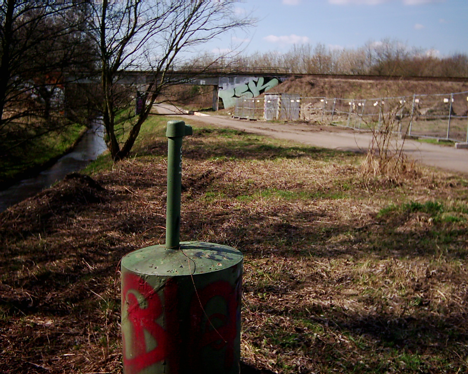 Die Panke ist von der Wasserwirtschaft Berlins und Brandenburgs überwacht. Pegelrohr vor der Brücke der Regionalbahn 27.